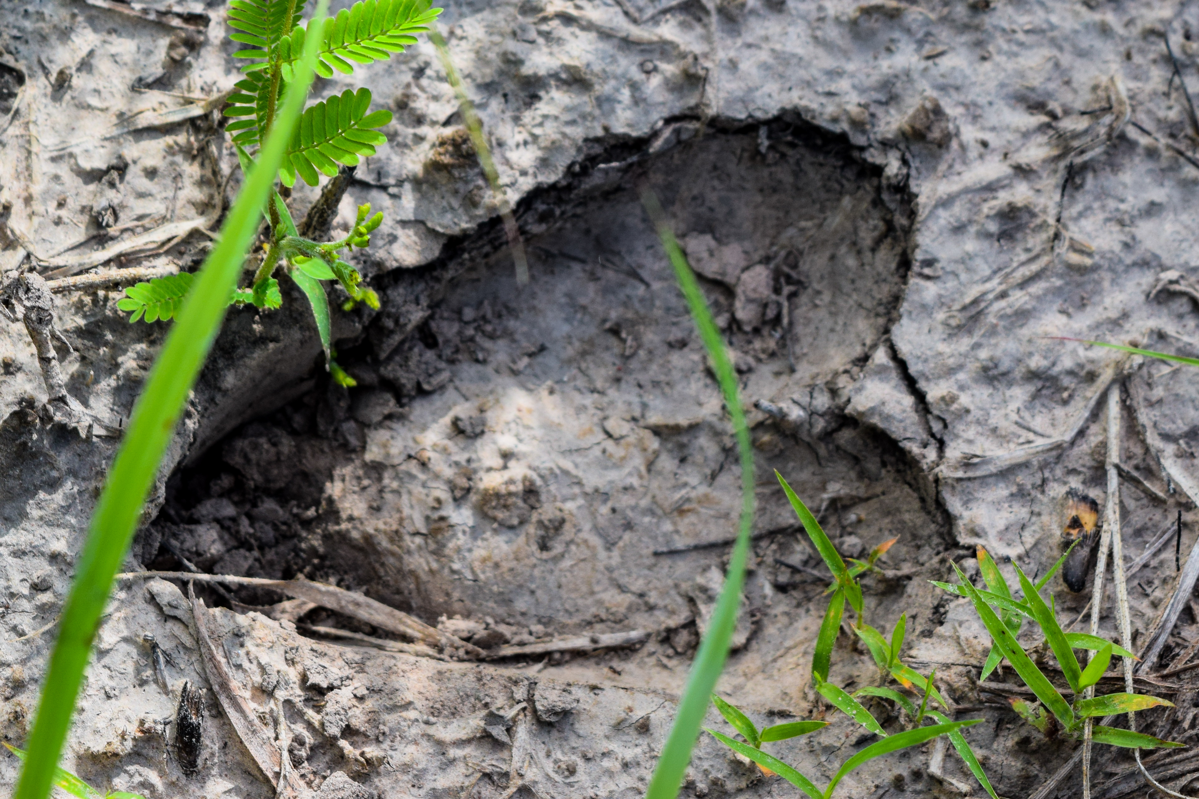 Empreinte d'hippotrague dans le parc national de la Pendjari